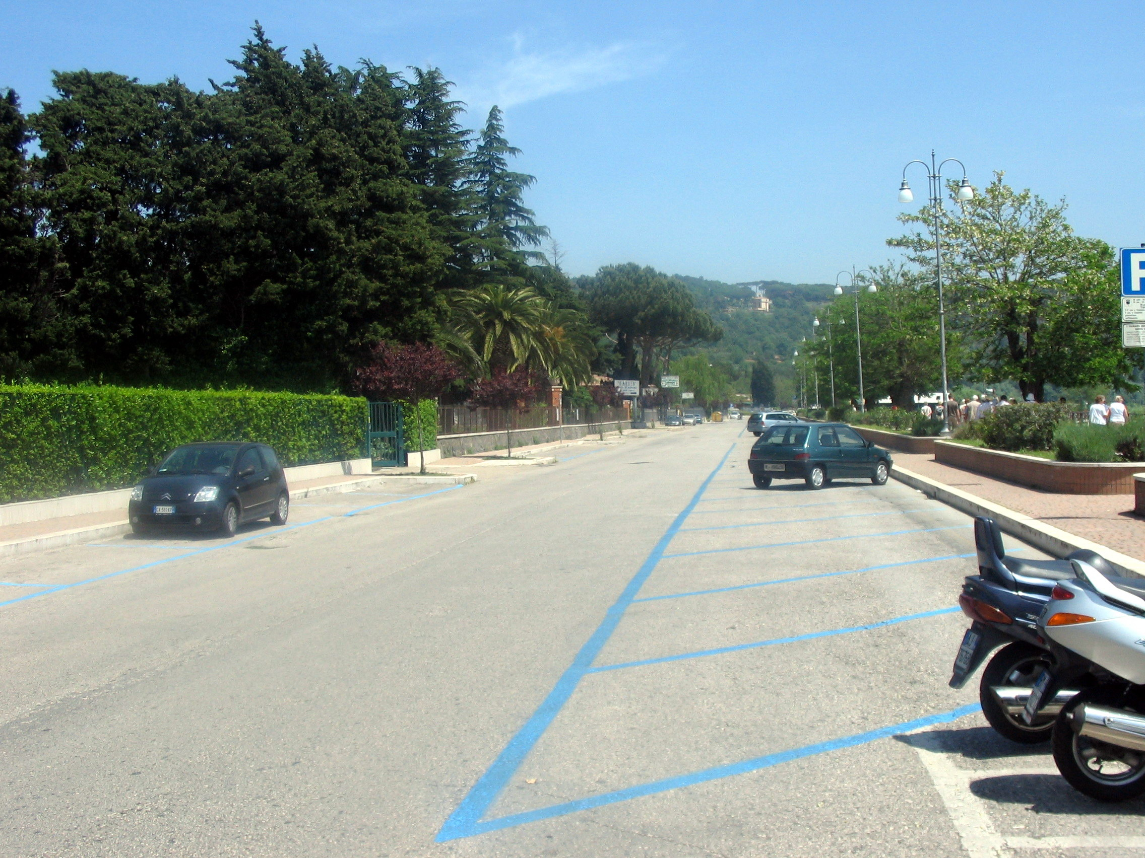 Castel Gandolfo, Lazio